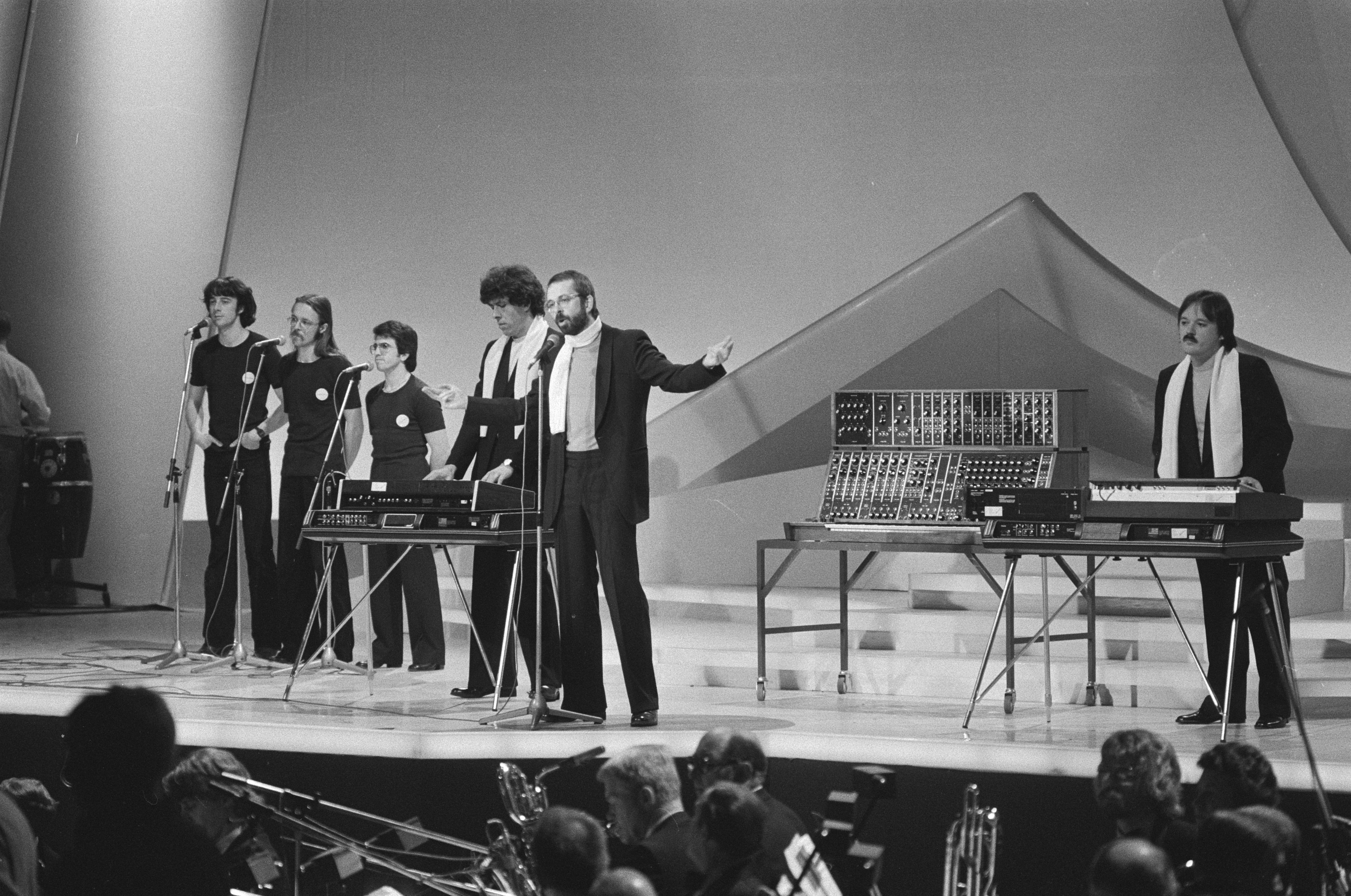 Collectie / Archief : Fotocollectie Anefo Reportage / Serie : [ onbekend ] Beschrijving : Deelnemers Eurovisie Song Festival in Den Haag ; Telex (Belgie) Datum : 22 april 1980 Locatie : België, Den Haag Trefwoorden : deelnemers, songfestivals, telexen Instellingsnaam : Eurovisie Song Festival Fotograaf : Dijk, Hans van / Anefo Auteursrechthebbende : Nationaal Archief Materiaalsoort : Negatief (zwart/wit) Nummer archiefinventaris : bekijk toegang 2.24.01.05 Bestanddeelnummer : 930-7867